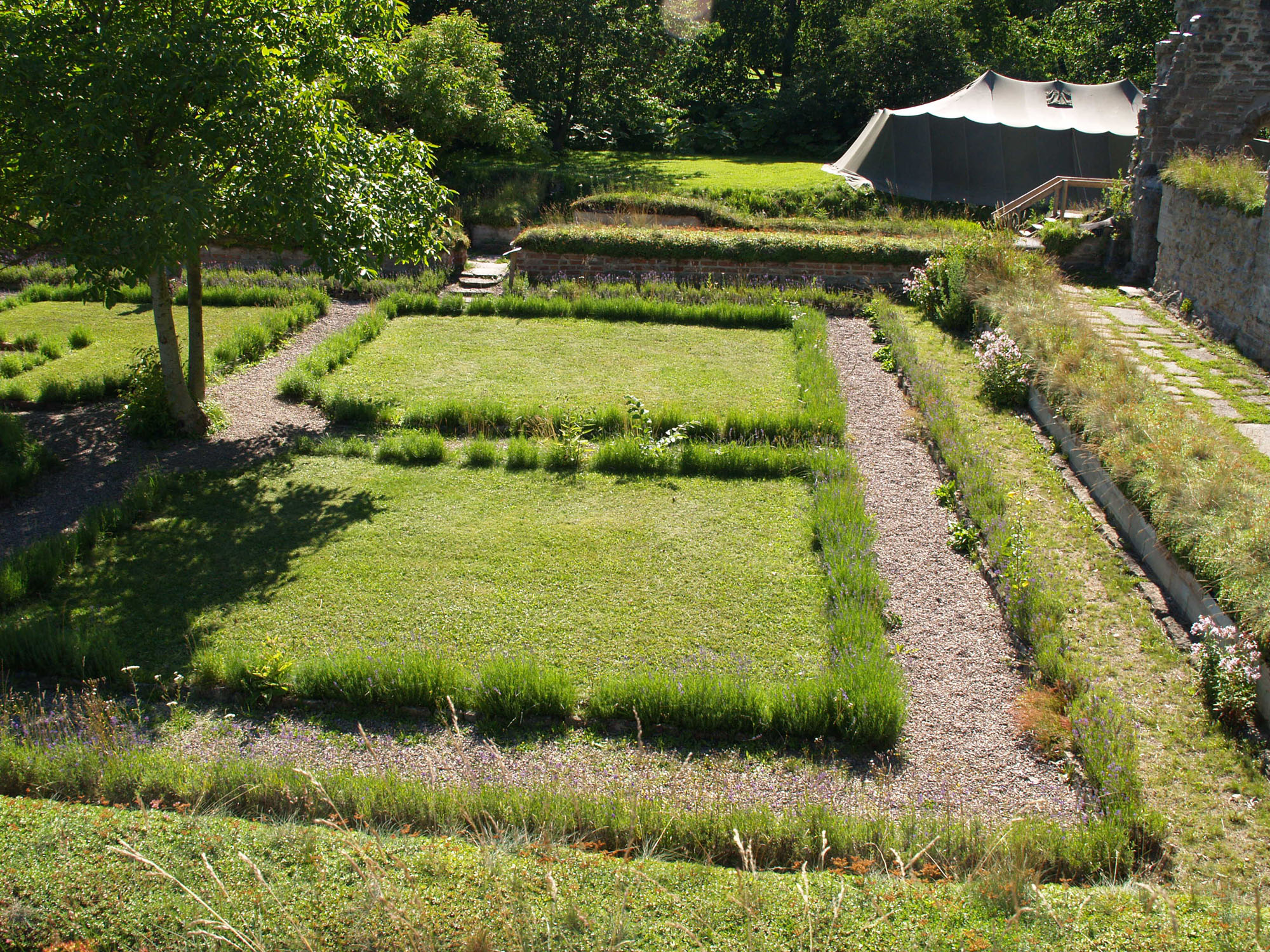 Klosterruine Alvastra, Ödeshög kommun, Svergie